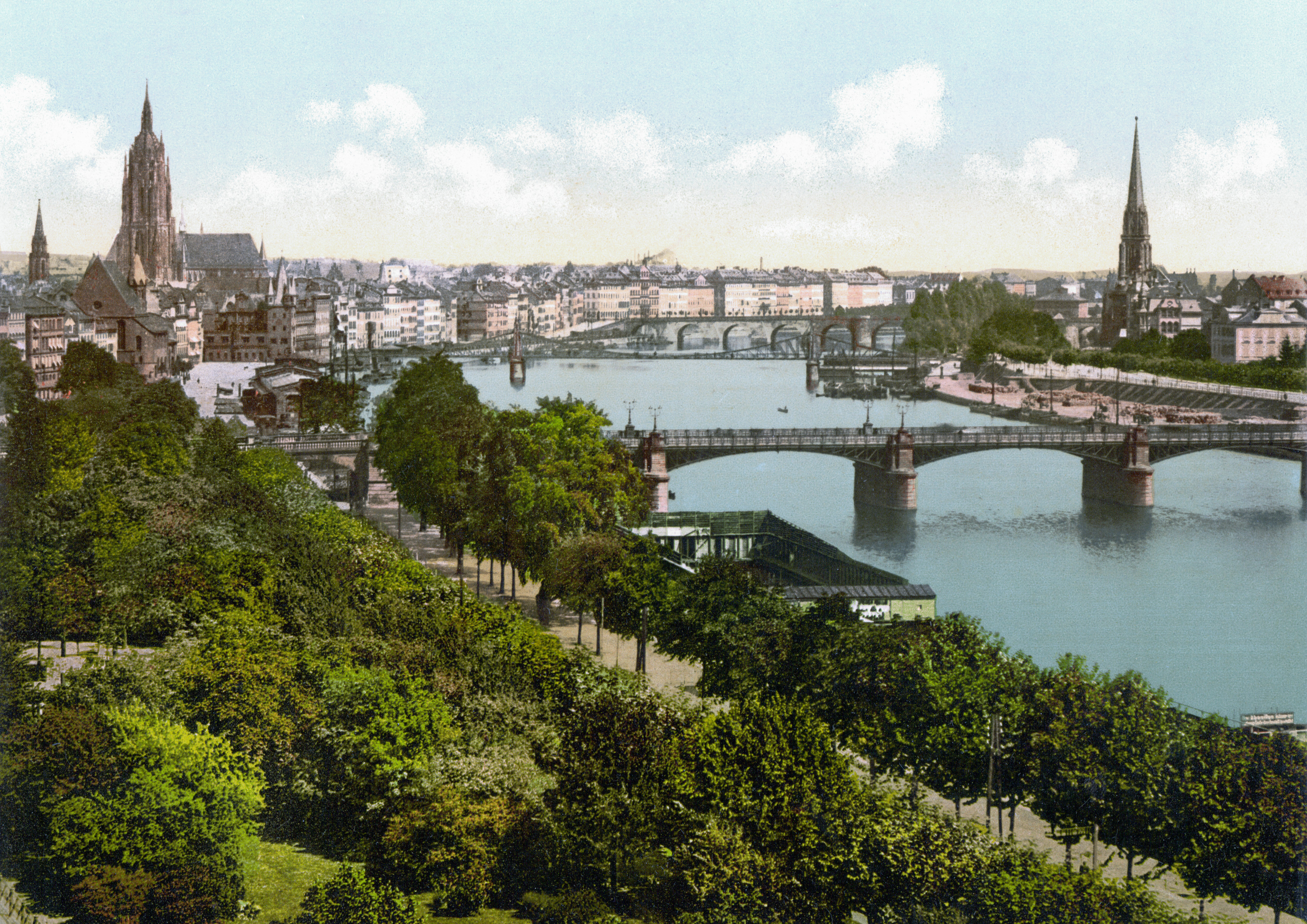 Frankfurt Sachsenhausen um 1900